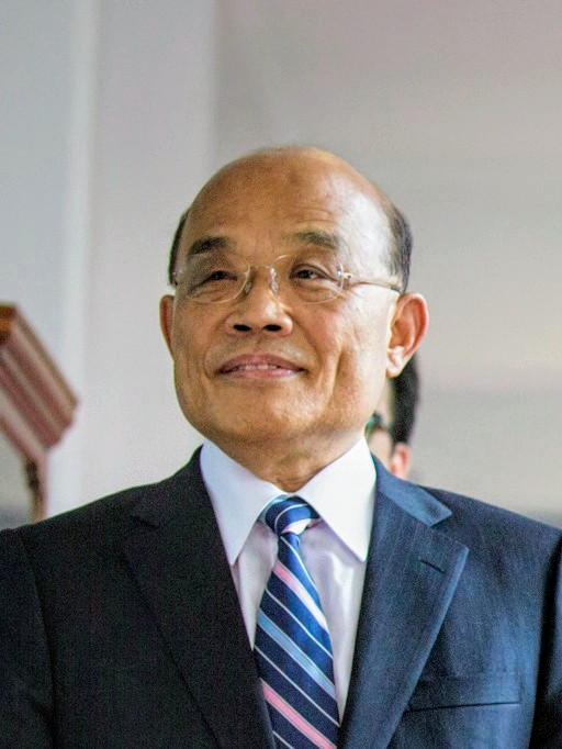 蘇貞昌院長